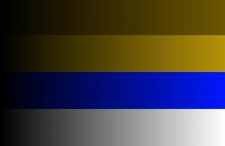 RGBW bars (deuteranopia)